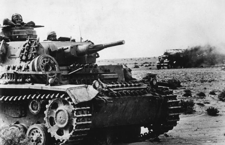 Deutsche Panzer während eines Gegenstoßes in der nordafrikanischen Wüste. Feindliche Fahrzeugkolonnen sind überrumpelt und zusammengeschossen worden. Die Panzer stoßen immer weiter gegen Osten vor. 18.2.1942 [Herausgabedatum]